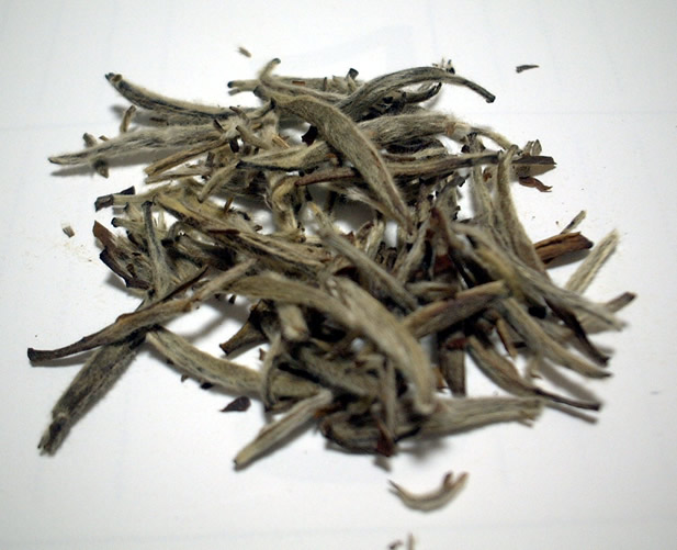 白茶の一種、白蒙銀針の茶葉。投稿者による撮影